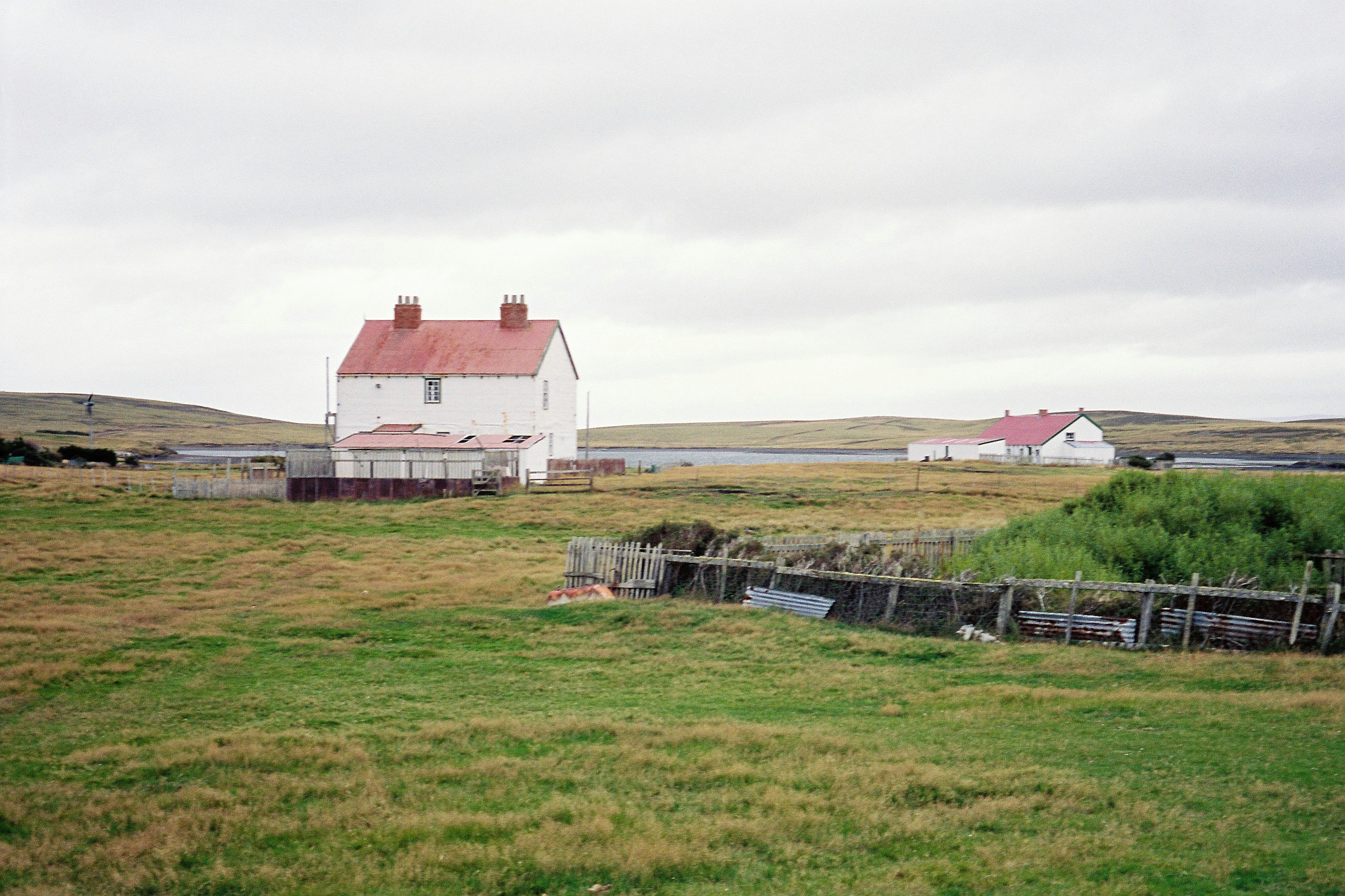 Darwin Settlement, Falkland Islands